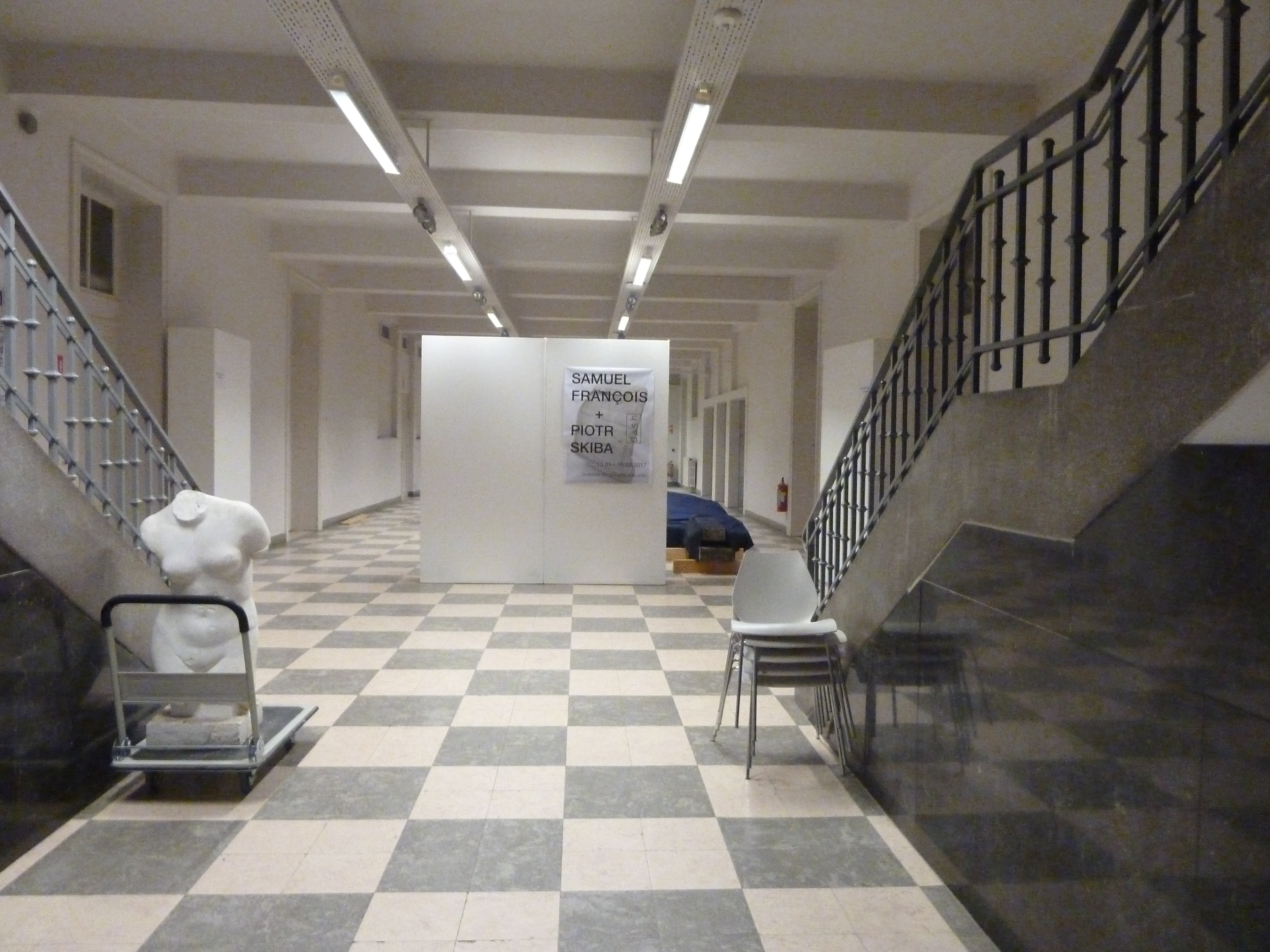 Binnenkant KASK Kortrijk